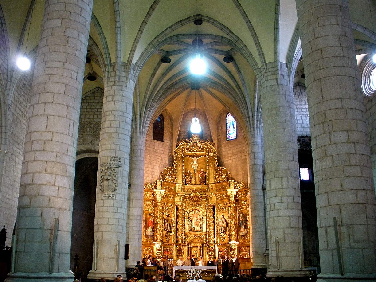 Iglesia de San Vicente Mártir, Vitoria-Gasteiz